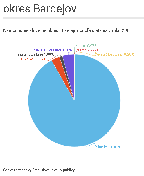 Národnostné zloženie obyvateľstva (v %) v okrese Bardejov, podľa sčítania v roku 2001.